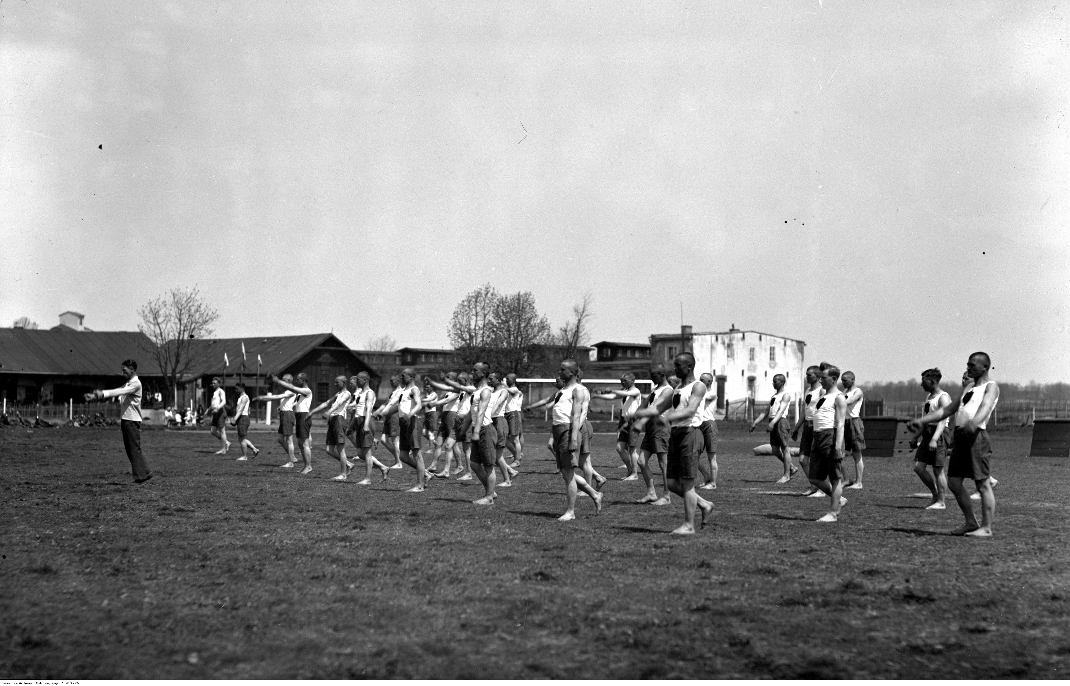 Ranne ćwiczenia gimnastyczne w 8 Batalionie Saperów w Toruniu. Grupa żołnierzy w strojach gimnastycznych podczas ćwiczeń. Koncern Ilustrowany Kurier Codzienny - Archiwum Ilustracji. Sygnatura: 1-W-1726